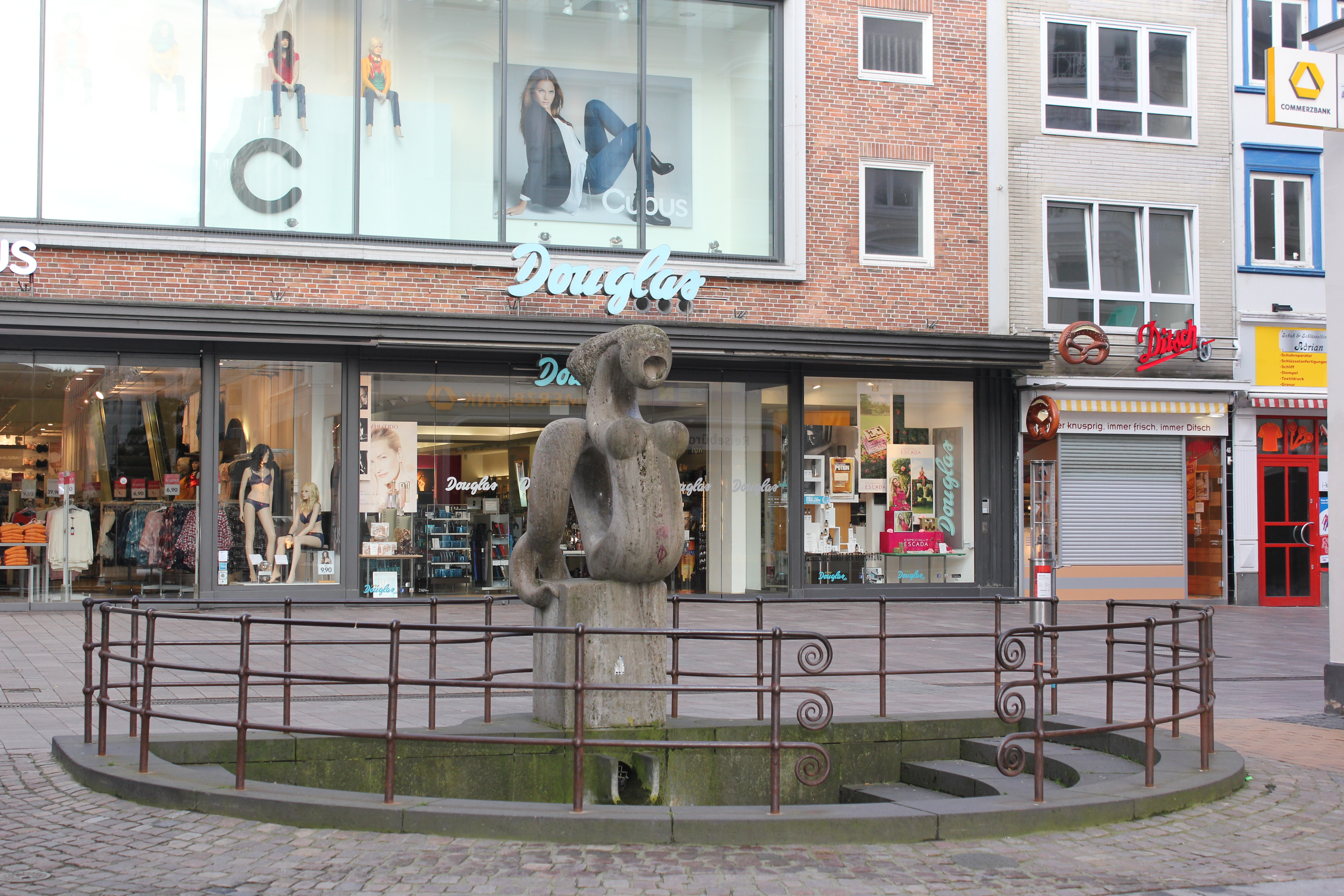 View to the Holm from the (street) Nikolaistraße; rechts sieht man das alte, schmale Haus von Fröbelhaus